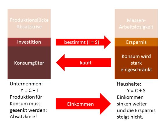 Investitionen wie Einnahmen & gesamtwirtschaftliche Nachfrage rückläufig - Saldenmechanik der Absatzkrise